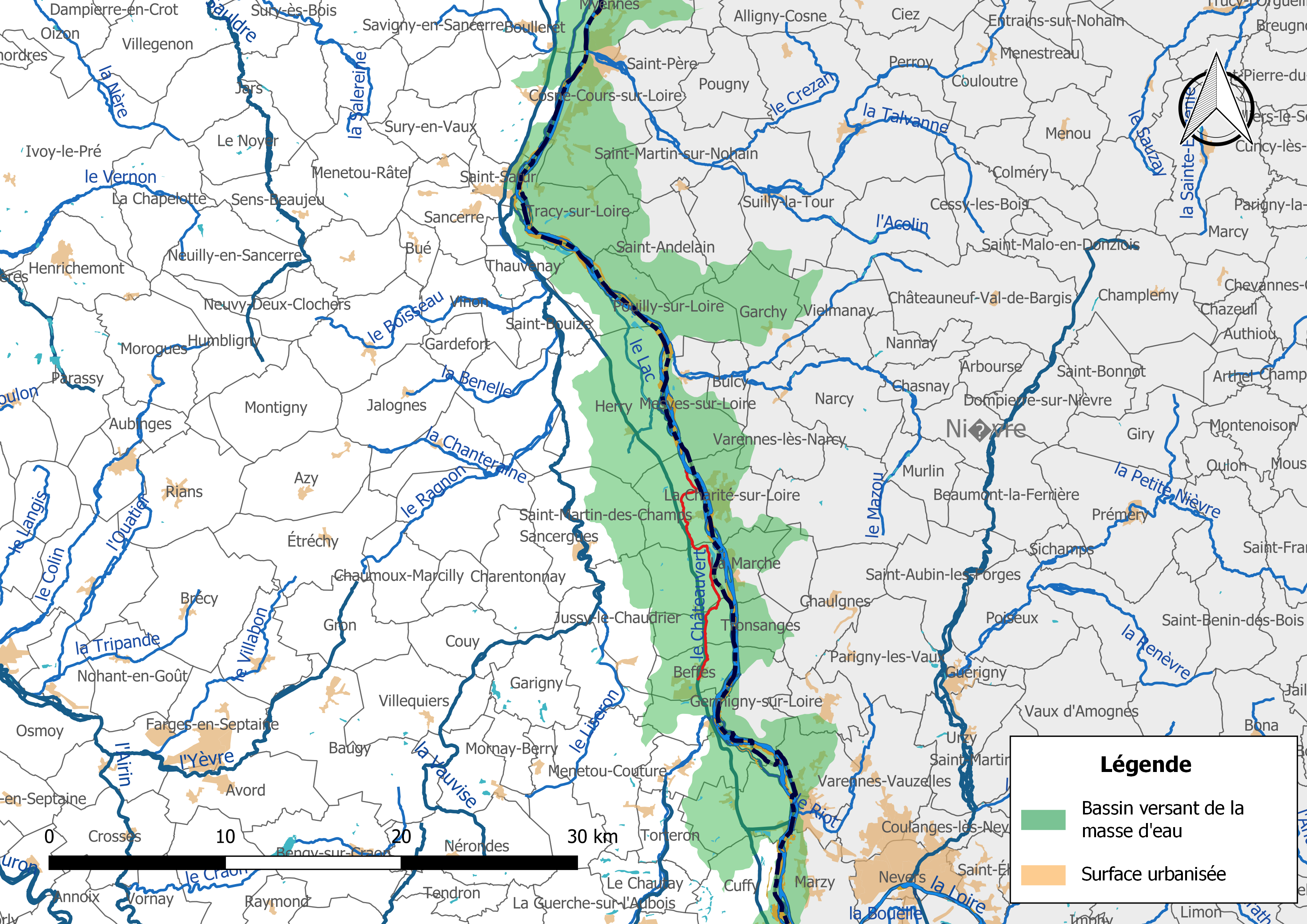 Carte de la masse d'eau « FRGR0007a », avec mise en exergue du cours d'eau « le Chateauvert » (en rouge).